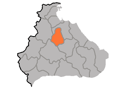 Kosan county map